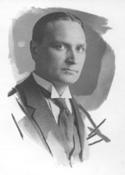 Jaan Rumma